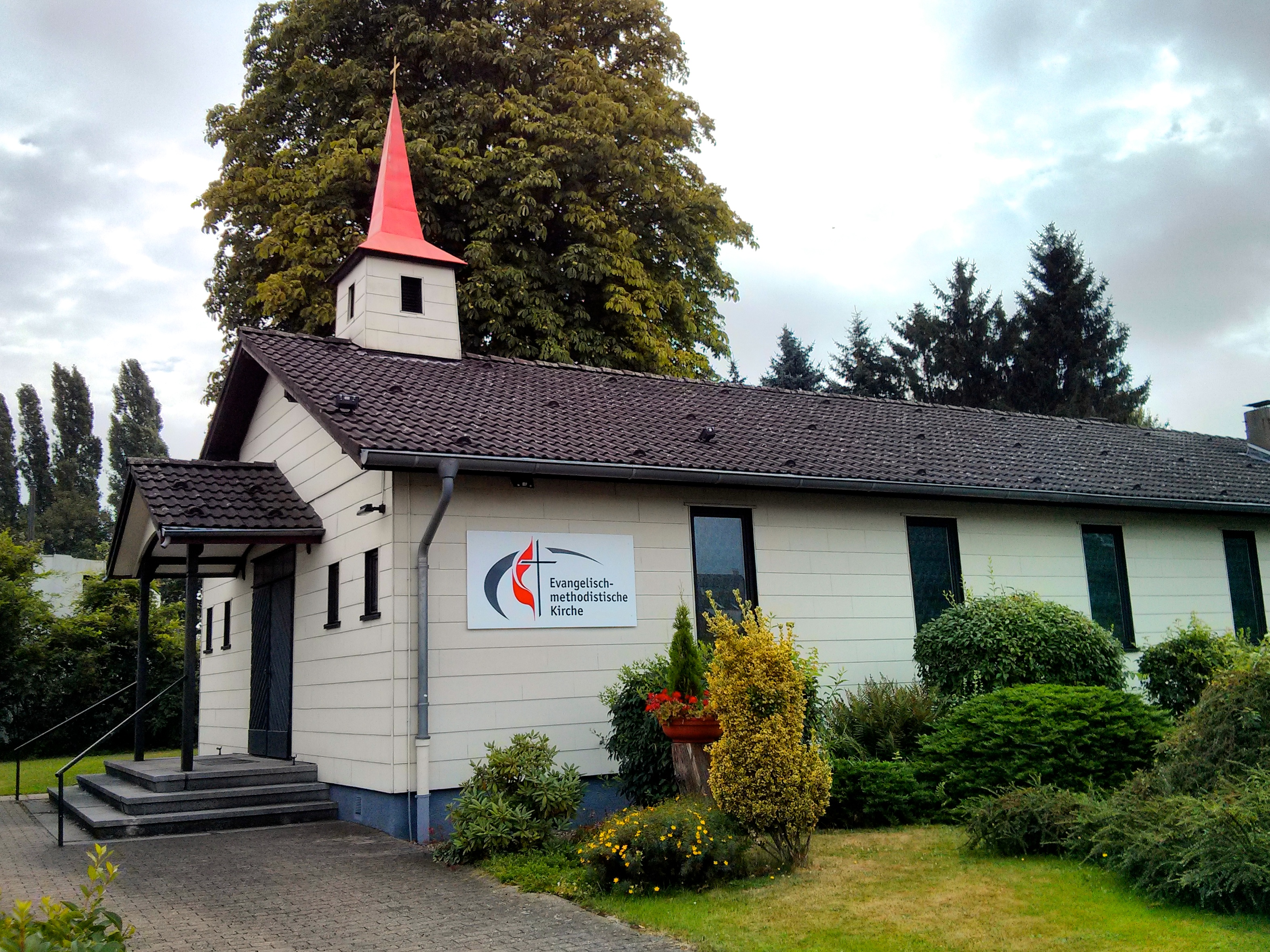 Ev.-Methodistische Eben-Ezer-kirche, Ruhrorter Straße 14, Mülheim an der Ruhr